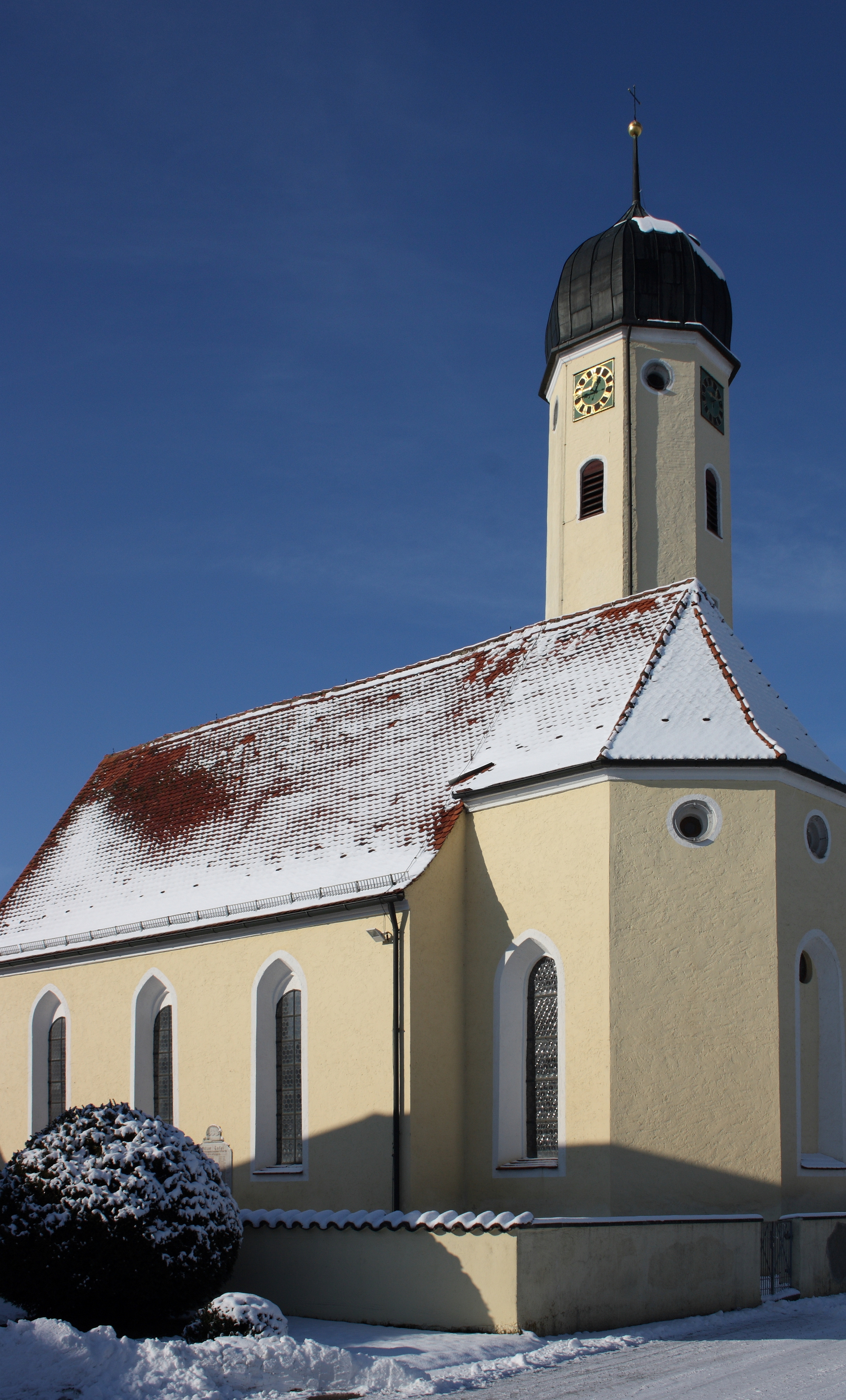 Katholische Pfarrkirche St. Michael in Oberbechingen, einem Ortsteil der Gemeinde Bachhagel im Landkreis Dillingen an der Donau (Bayern), Ansicht von Südosten